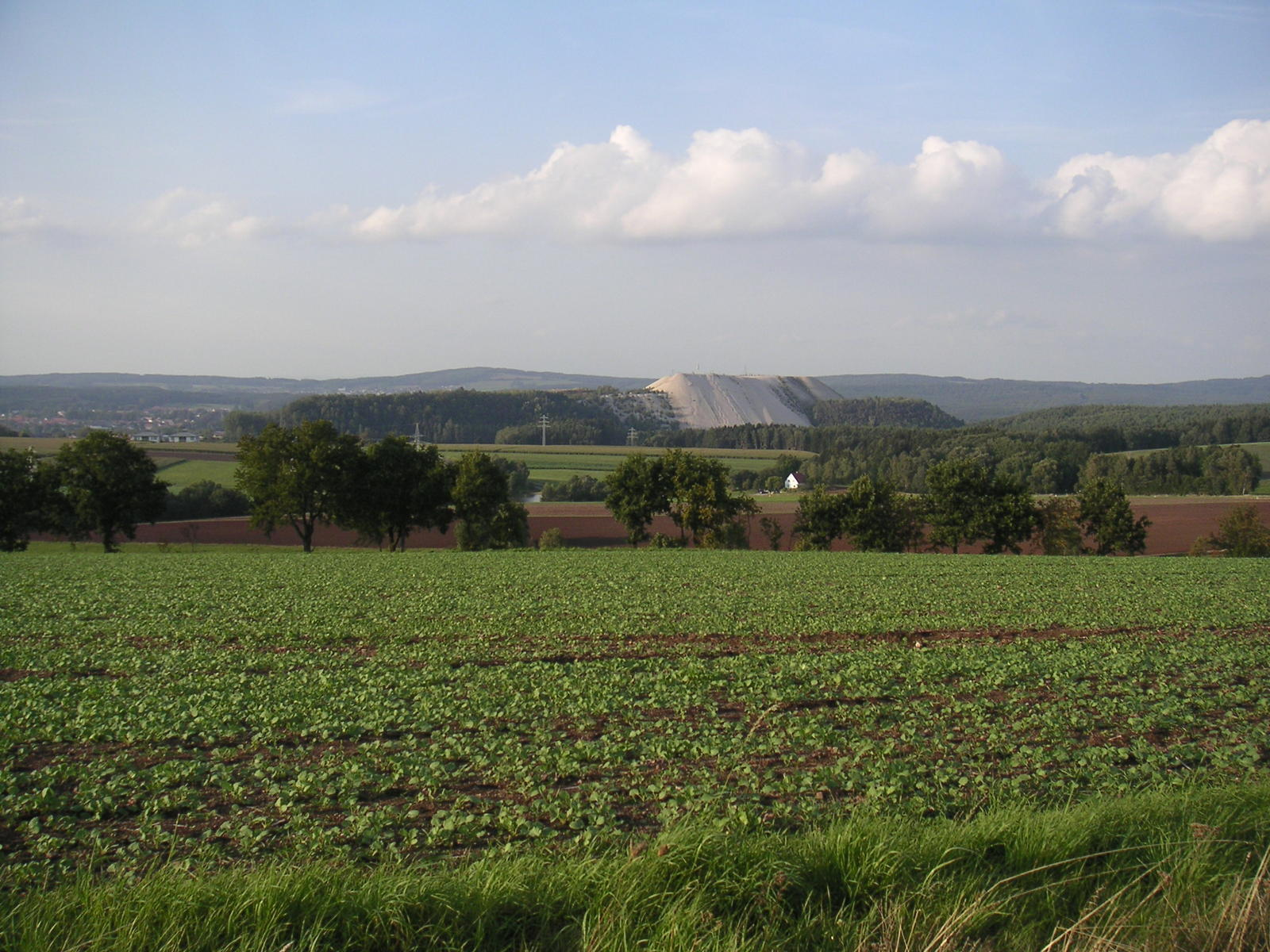 Monte Kaolino bei Weiher auf der Straße nach Pursruck fotografiert